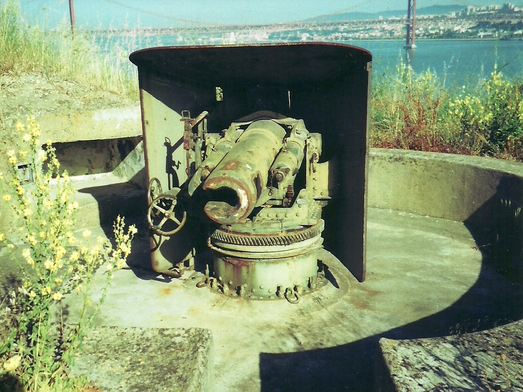 Forte de Almada, freguesia e concelho de Almada, distrito de Setúbal, Portugal: antiga peça de artilharia.